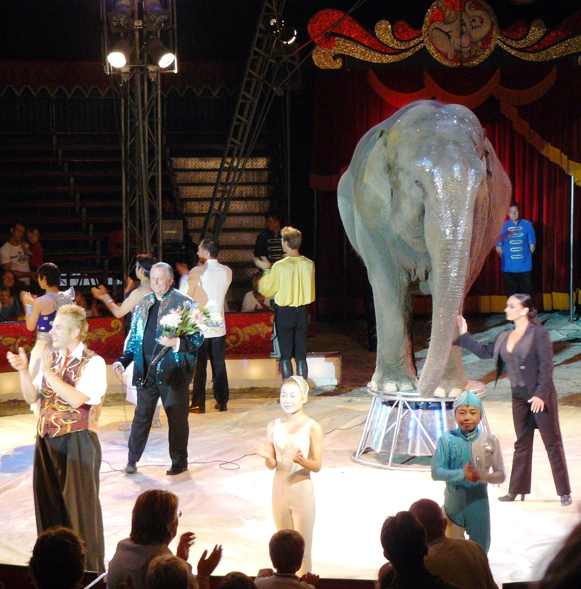 Cirkus Merano, Norwegian Cirkus